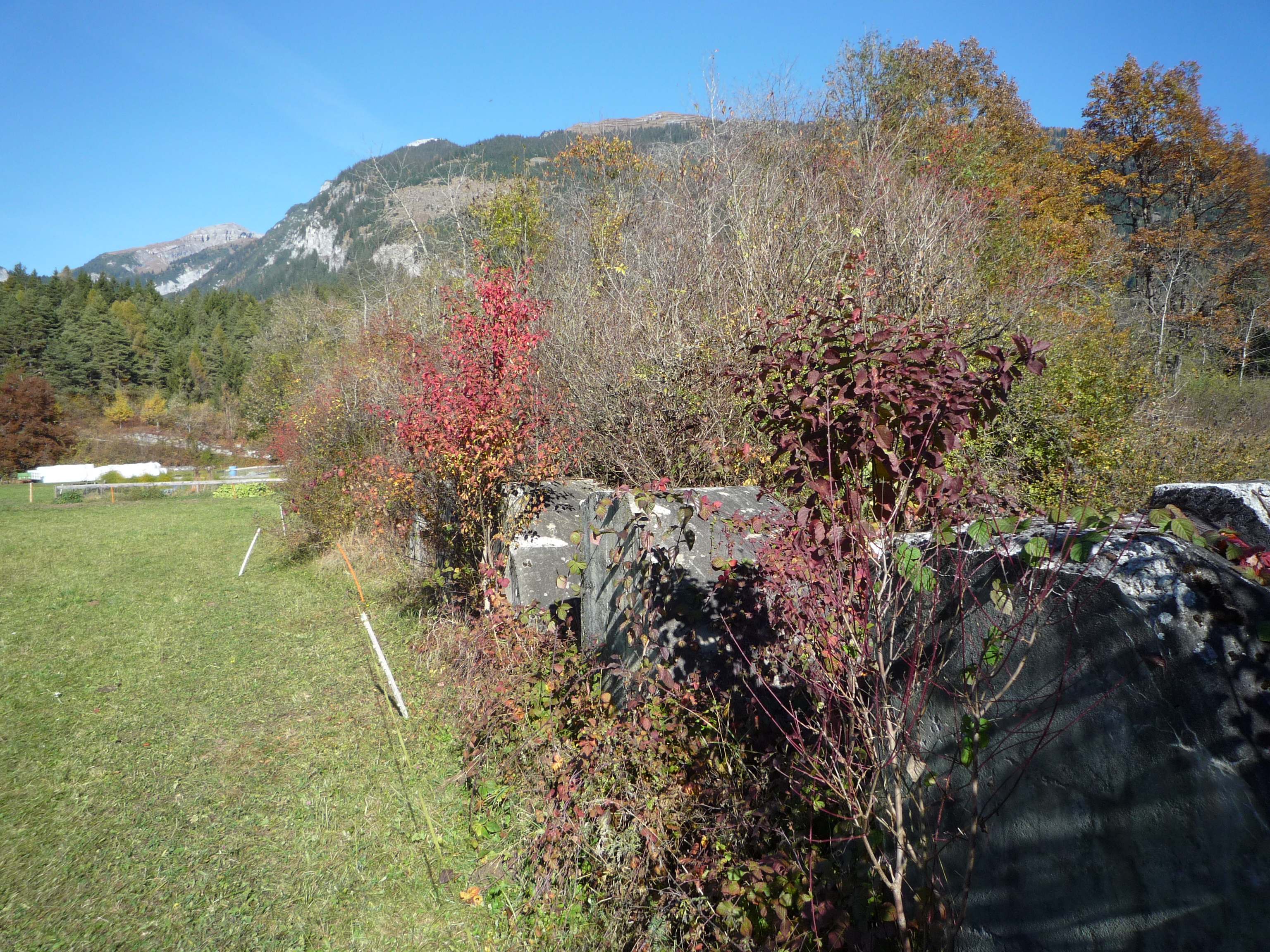 Geländepanzerhindernis T 4070 «Laseaz» Richtung Norden gesehen